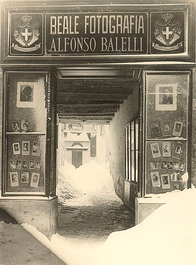 Vetrina dello Studio Balelli a Macerata